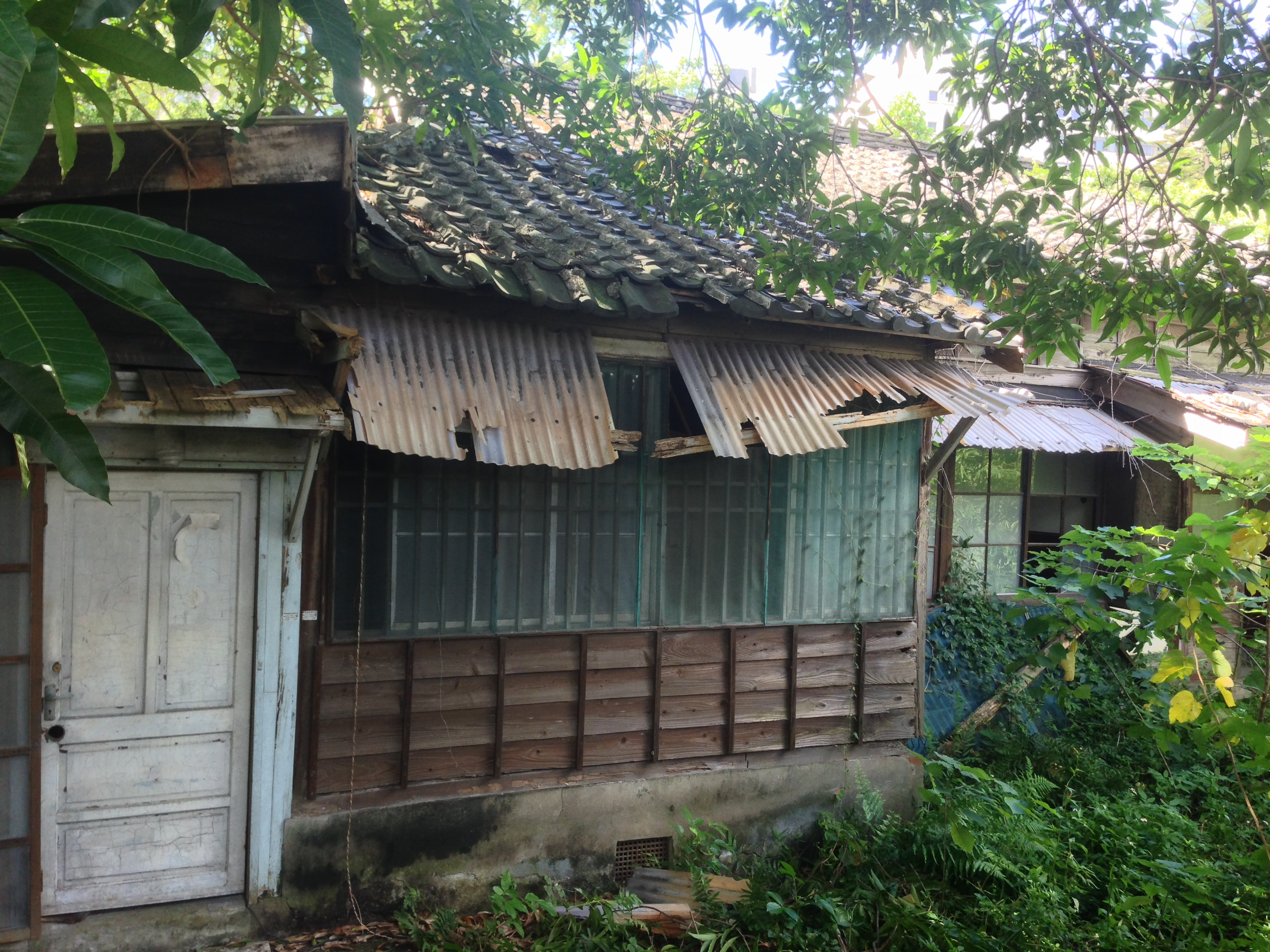 中文（台灣）: 李鎮源故居，位於臺北市中正區紹興南街32巷2號。